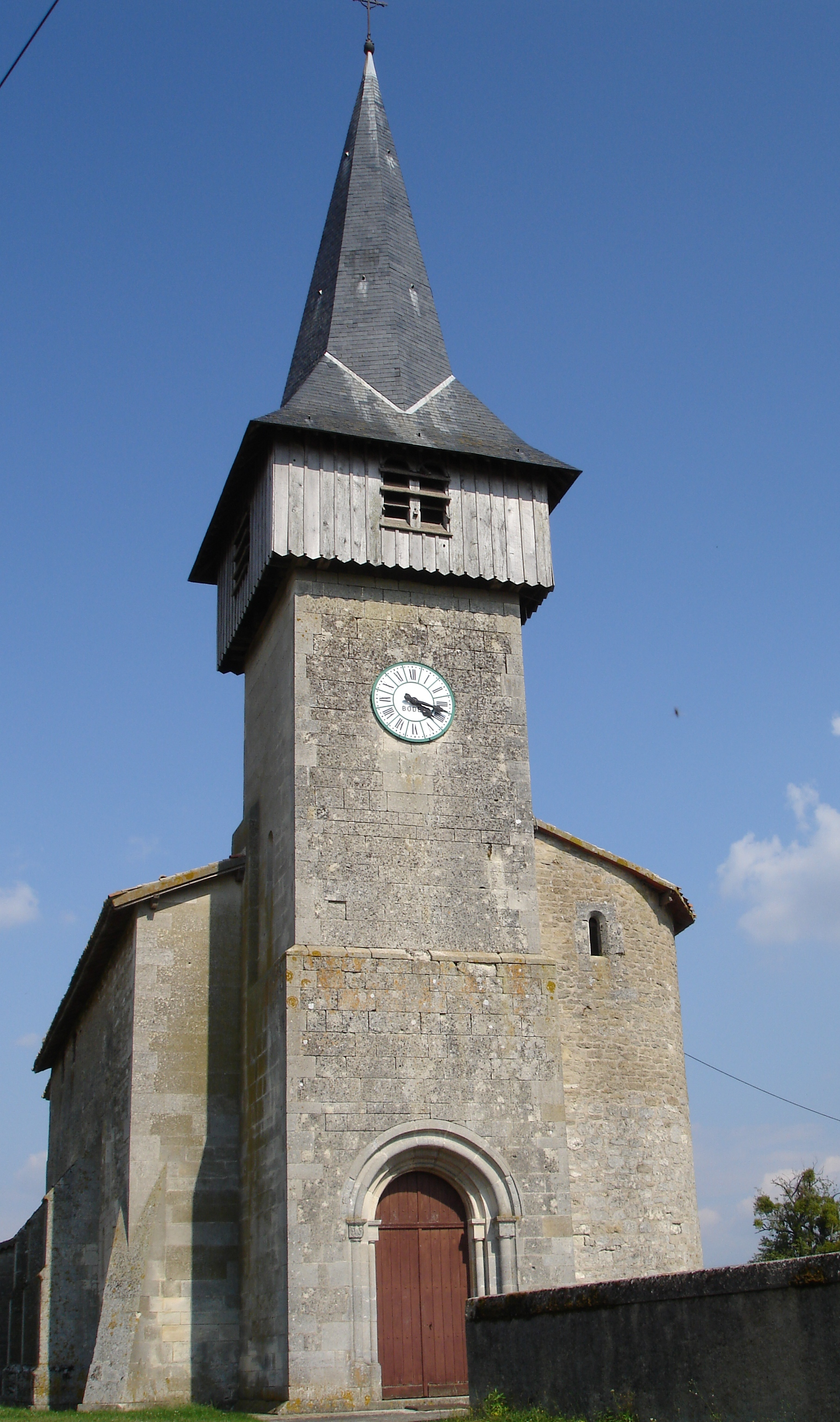 ÉGLISE SAINT REMY DE PAREID (55)